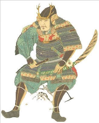 菊池武重の肖像。